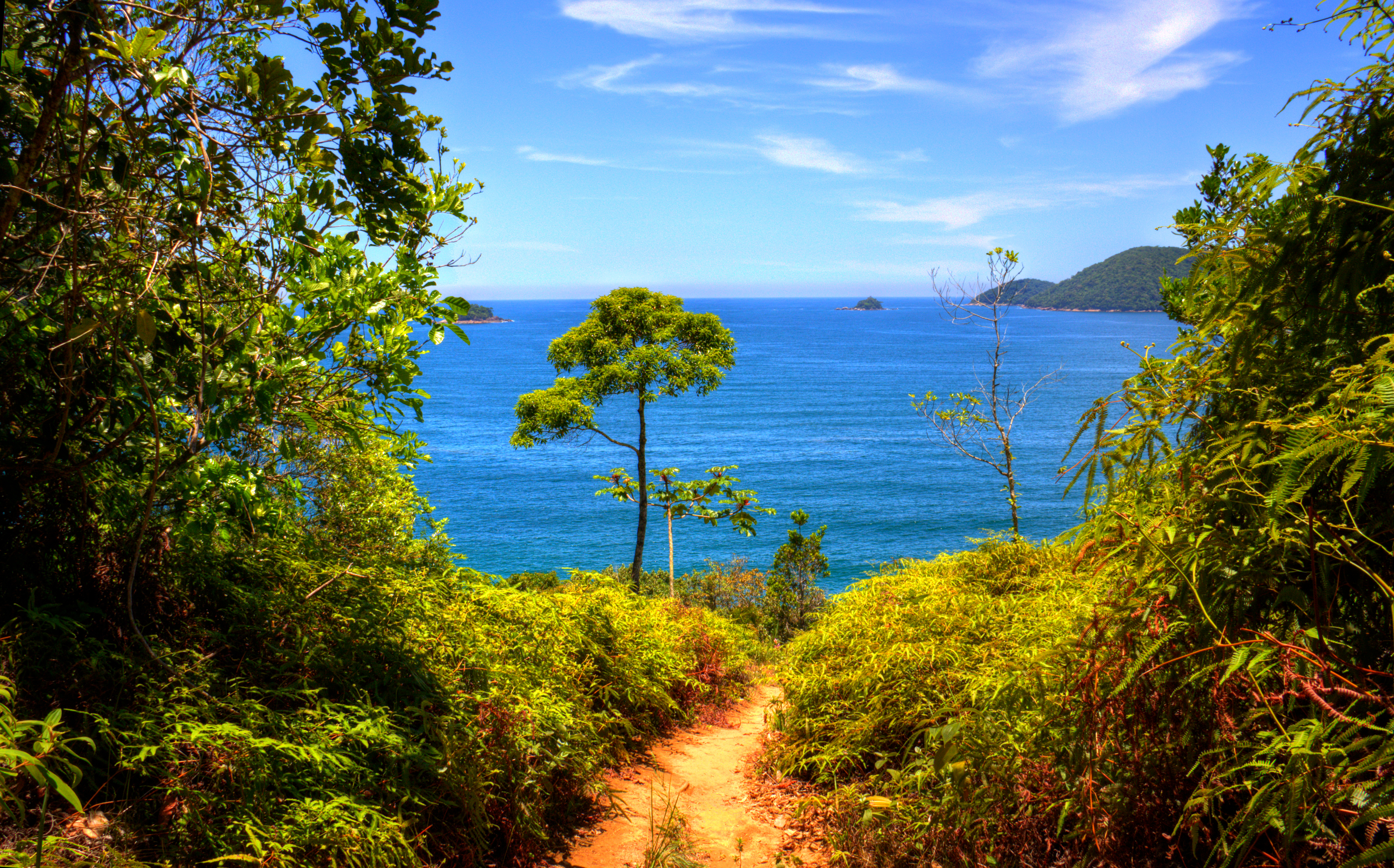 Visão da trilha paradisíaca do alto do morro da Praia do Cedro.